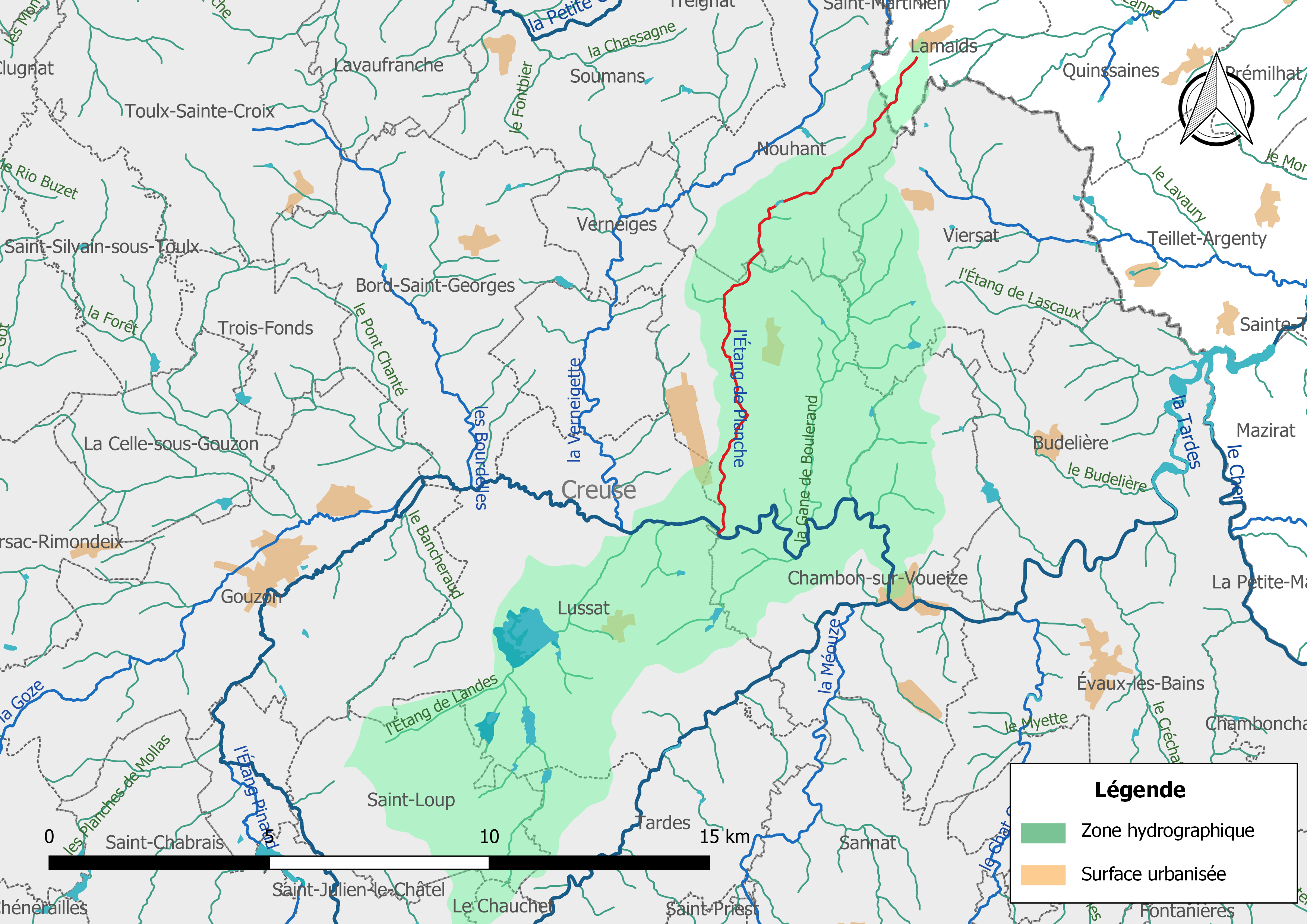 Carte du cours d'eau « l'Etang de Planche » (France) et de la zone hydrographique dans laquelle il s'insère.